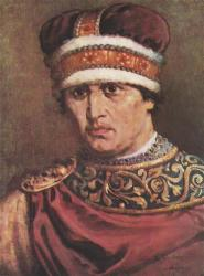 Władysław II Wygnaniec książę Polski (senior), wg. Jana Matejki.